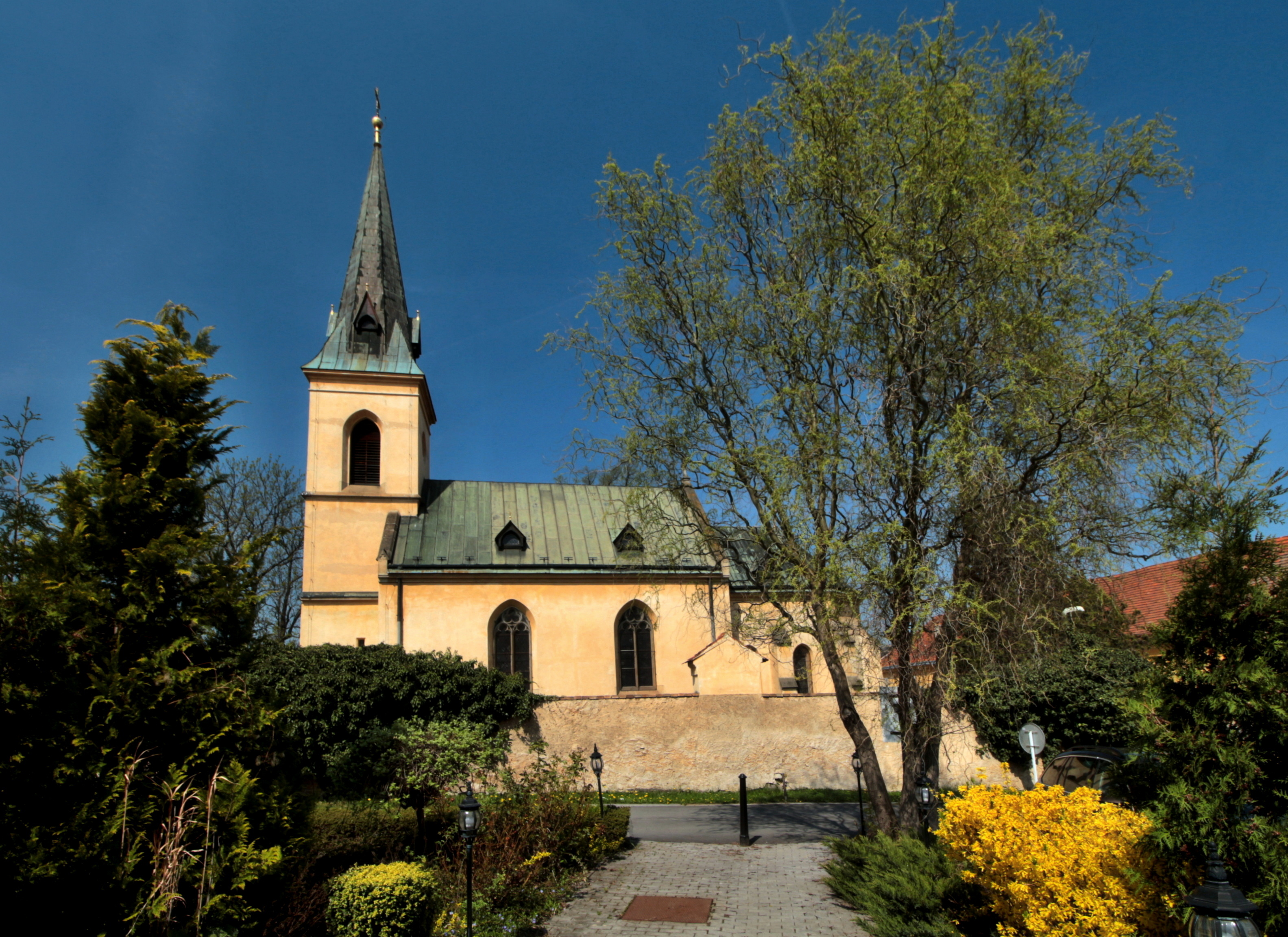 Hloubětín, kostel sv. Jiří